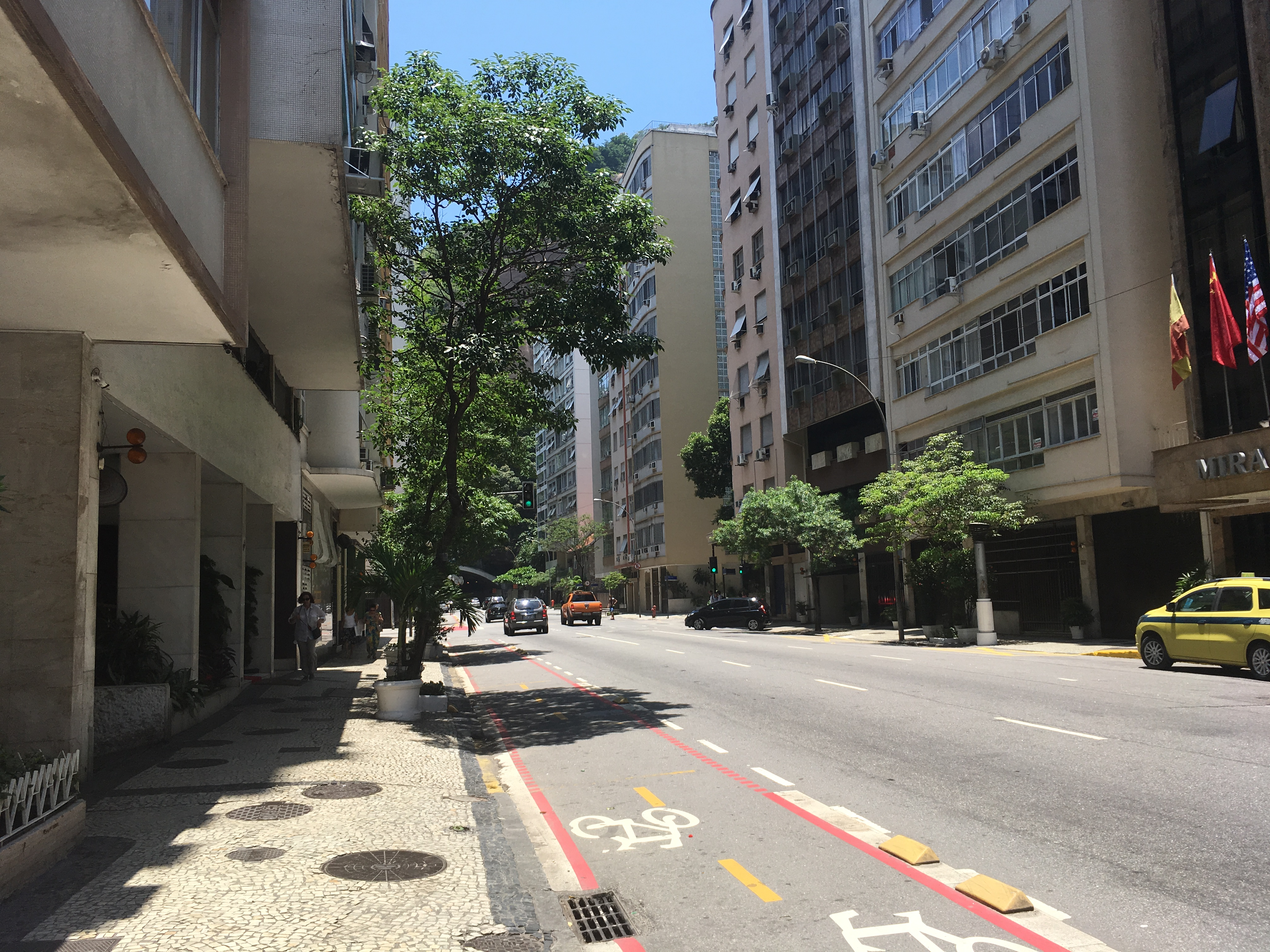 Rua Tonelero pela tarde